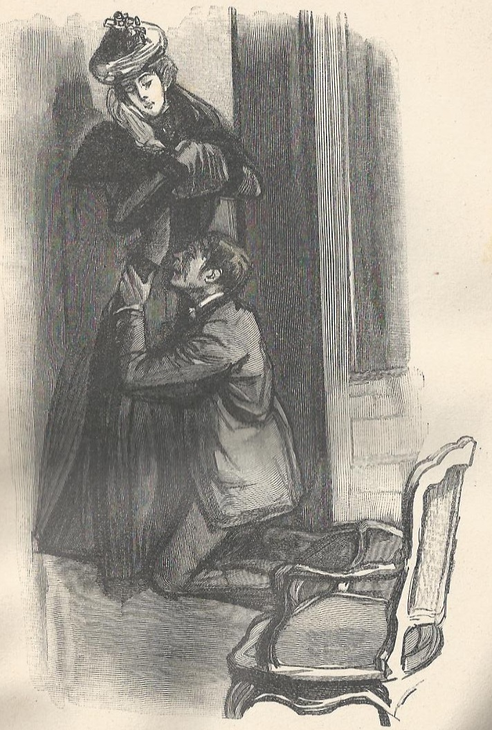 Illustration de Georges Jeanniot (1848-1934) pour "Le Calvaire", roman d'Octave Mirbeau (1848-1917). Éditions Ollendorff, 1901.